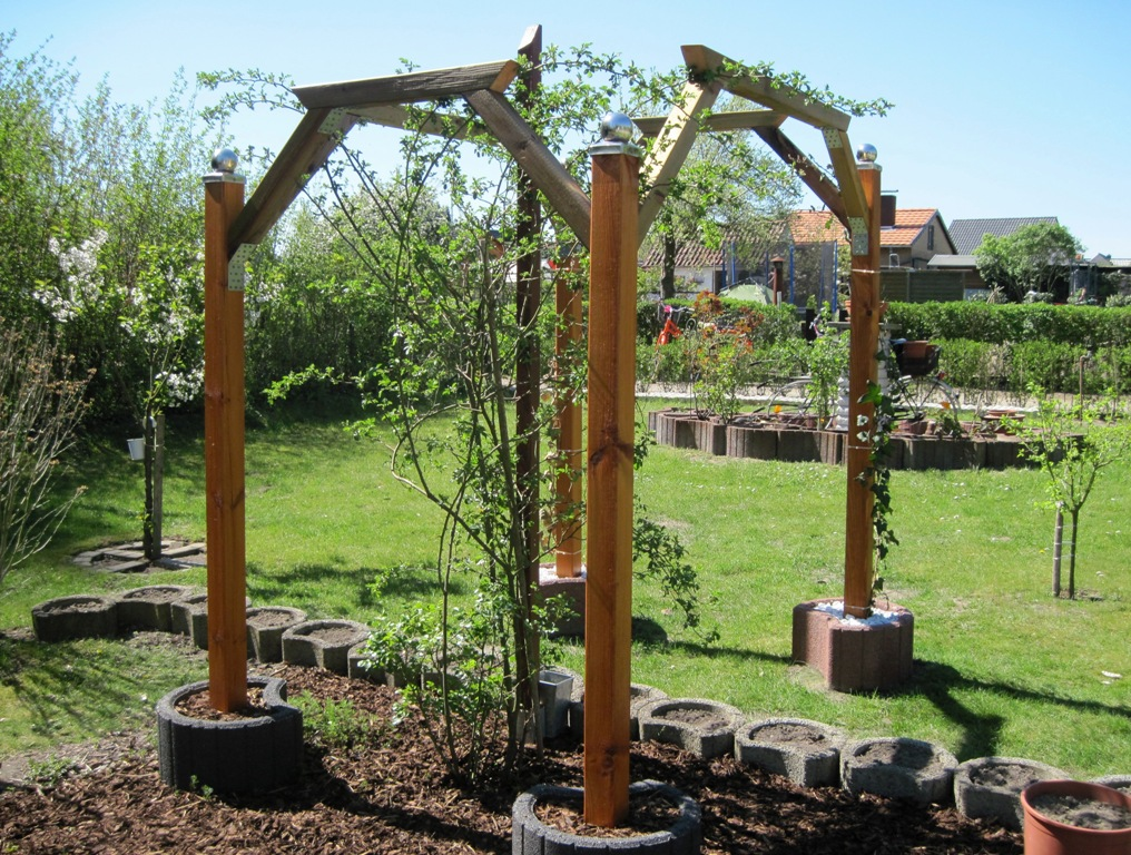 Pergola als Rankhilfe im Eigenbau für den Schrebergarten